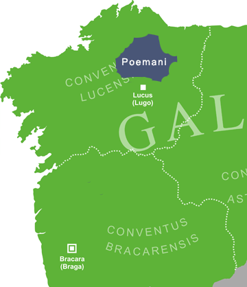 Mapa que amosa a situación aproximada da tribo dos poemanos ou Poemani, na provincia romana da Gallaecia.